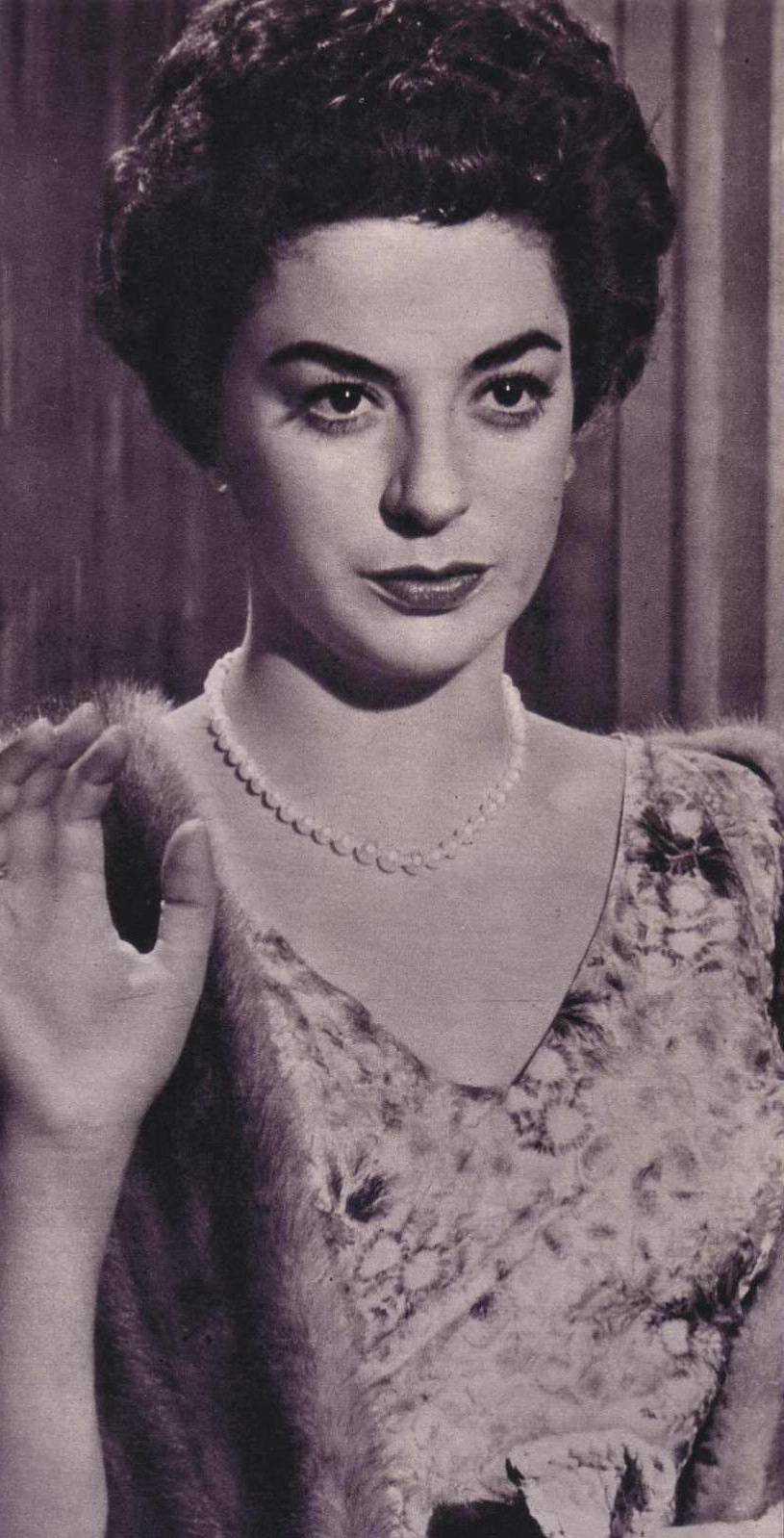 Italian singer Katyna Ranieri